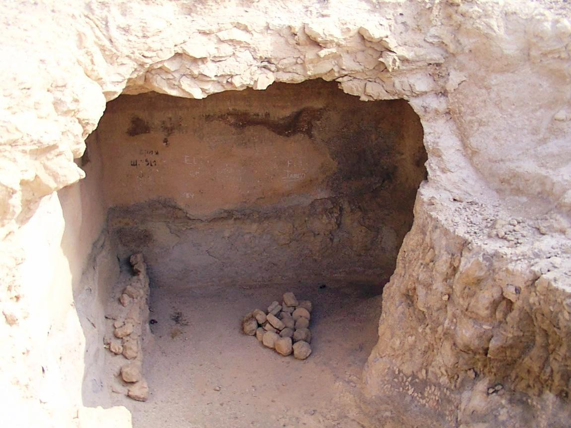 may be GENIZA